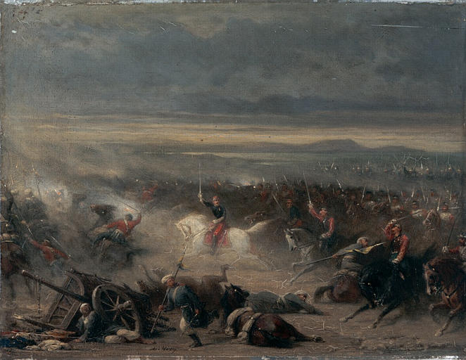 Bataille d'Eupatoria (1854). Huile sur bois. Musée des beaux-arts, Nantes.